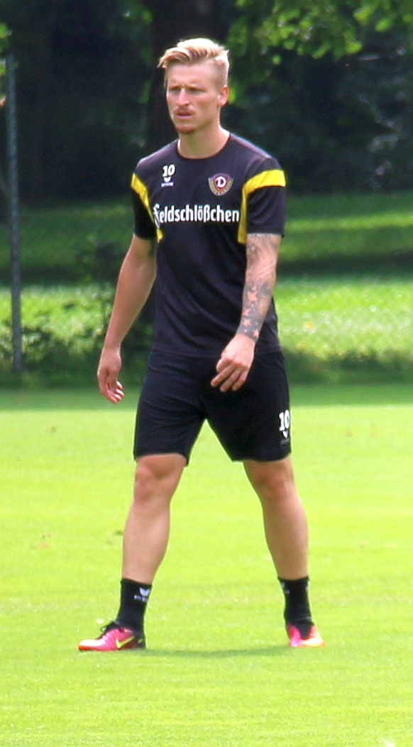 Marvin Stefaniak (SG Dynamo Dresden)